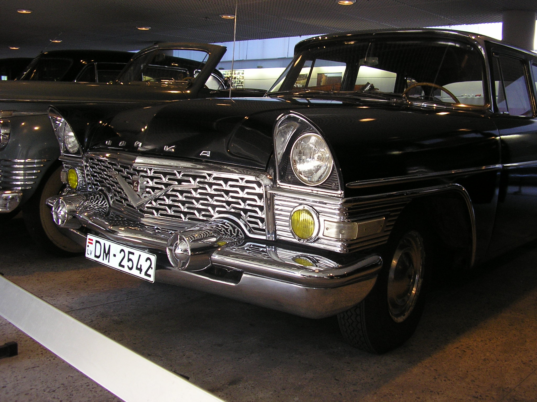 A 1974 GAZ-13 "Chaika"